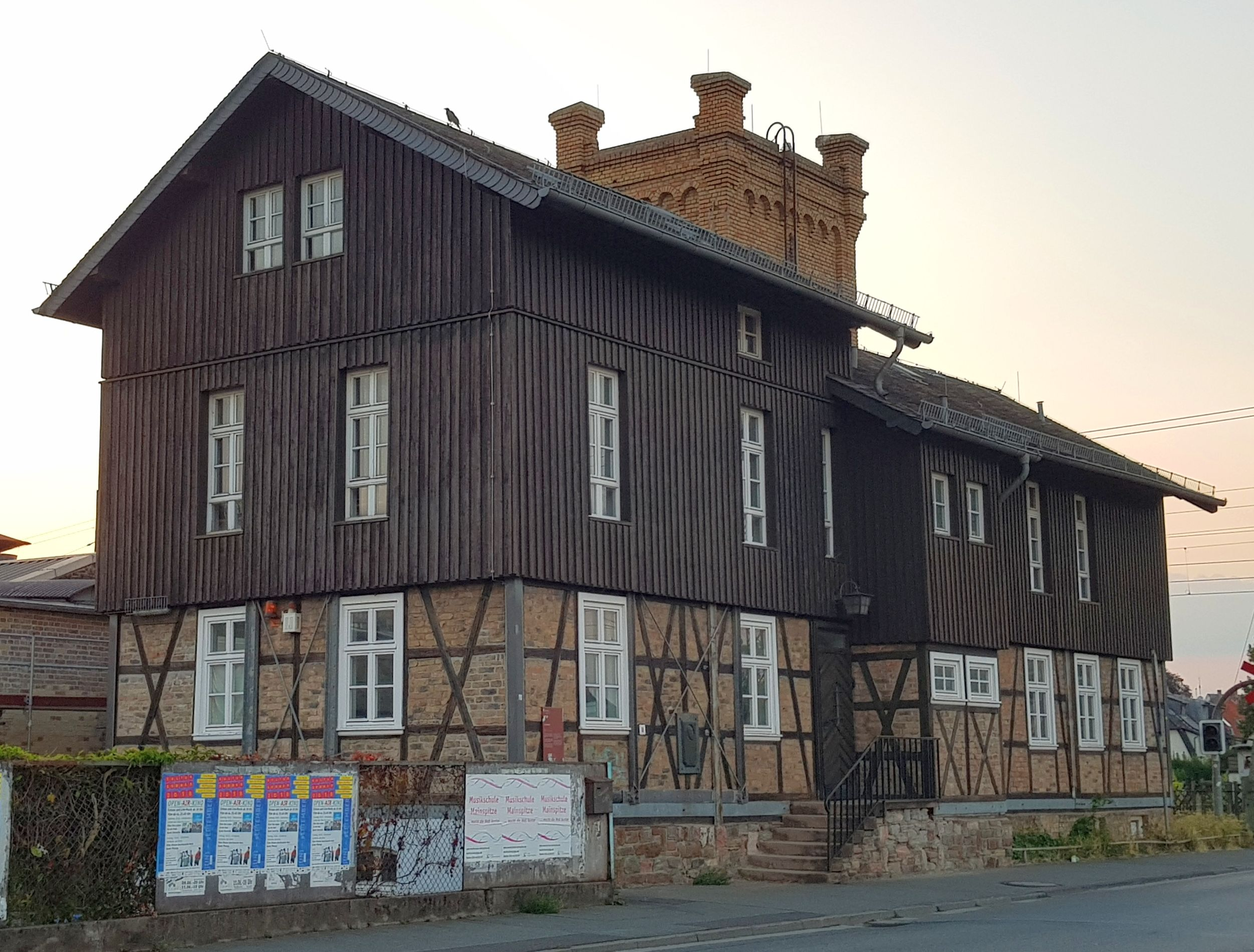 Gerberhaus